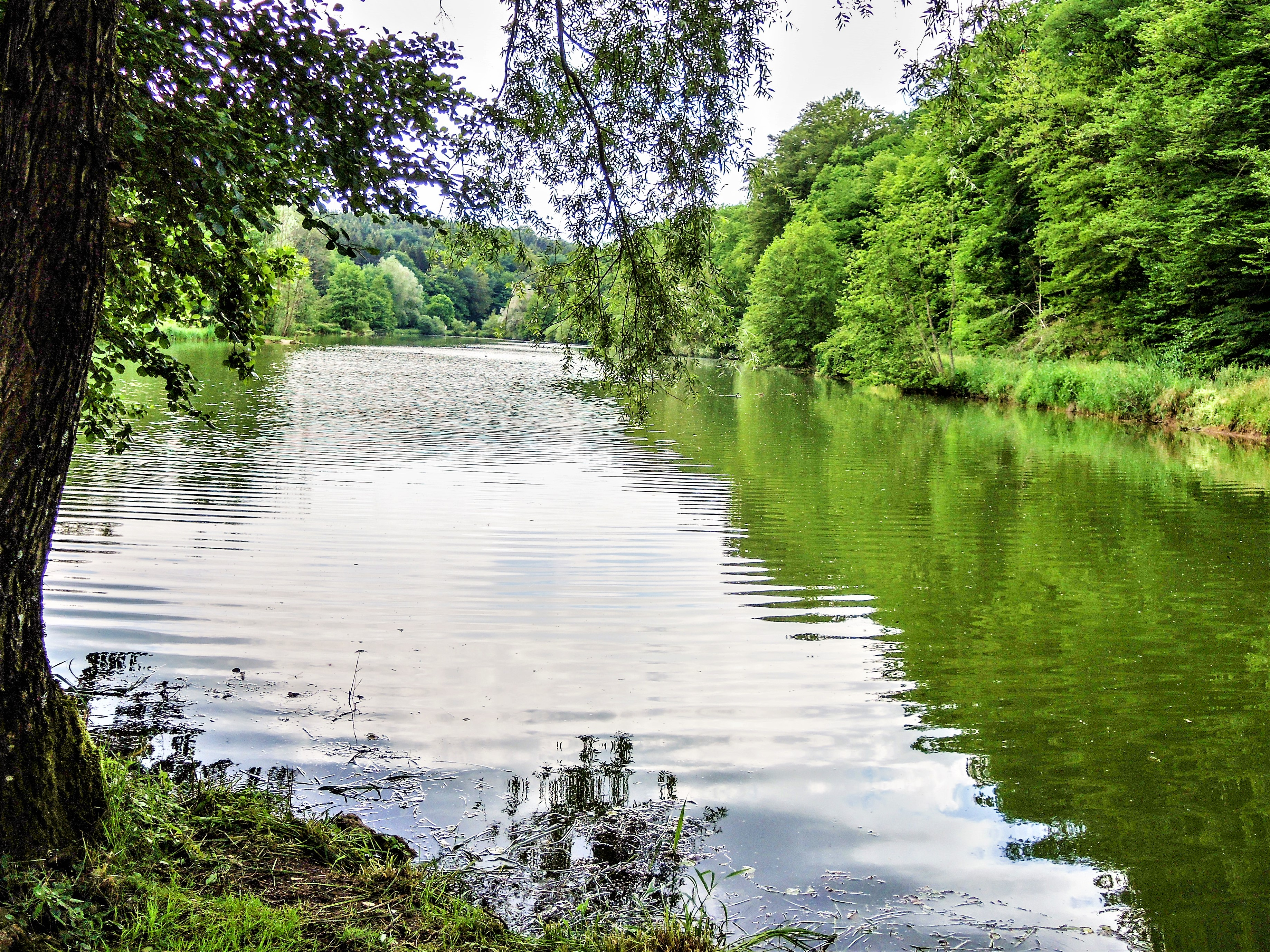 Le grand étang des princes, vu de la rive est. Raynans. Doubs